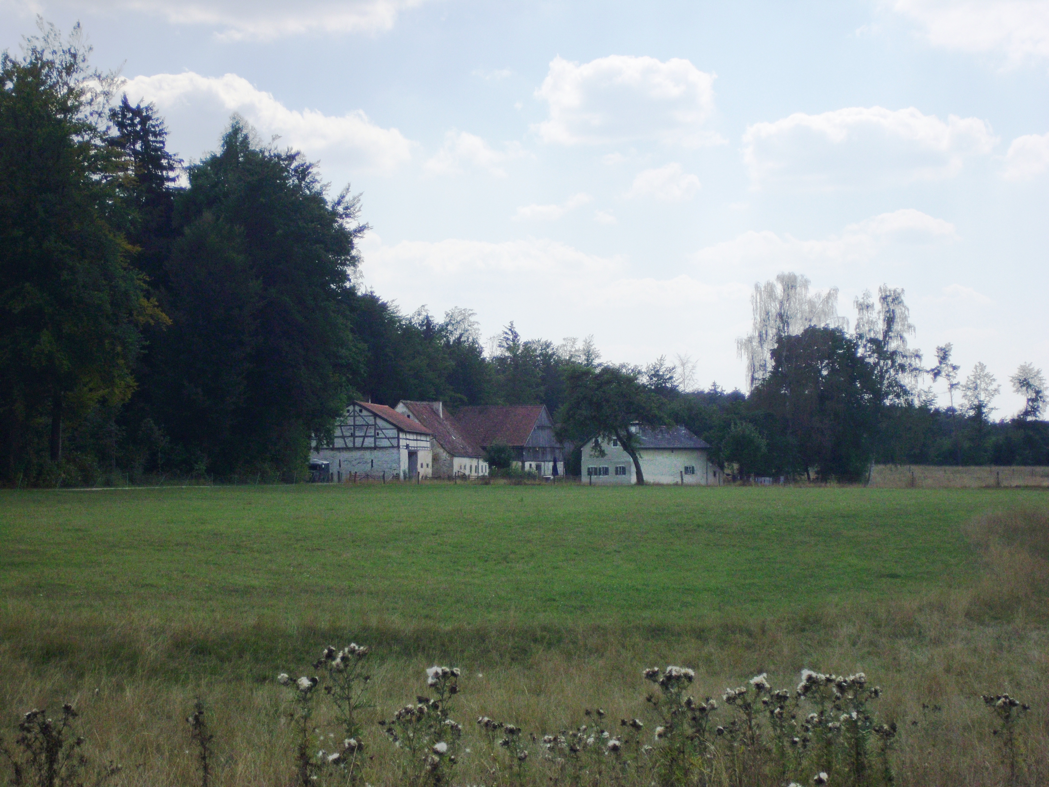 Euerwang, Ortsteil von Greding im mittelfränkischen Landkreis Roth in Bayern, Ziegelhof südlich von Euerwang